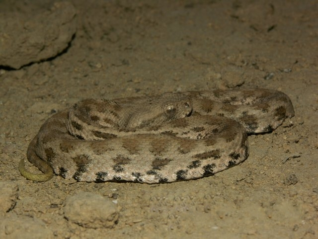 Macrovipera lebetina obtusa